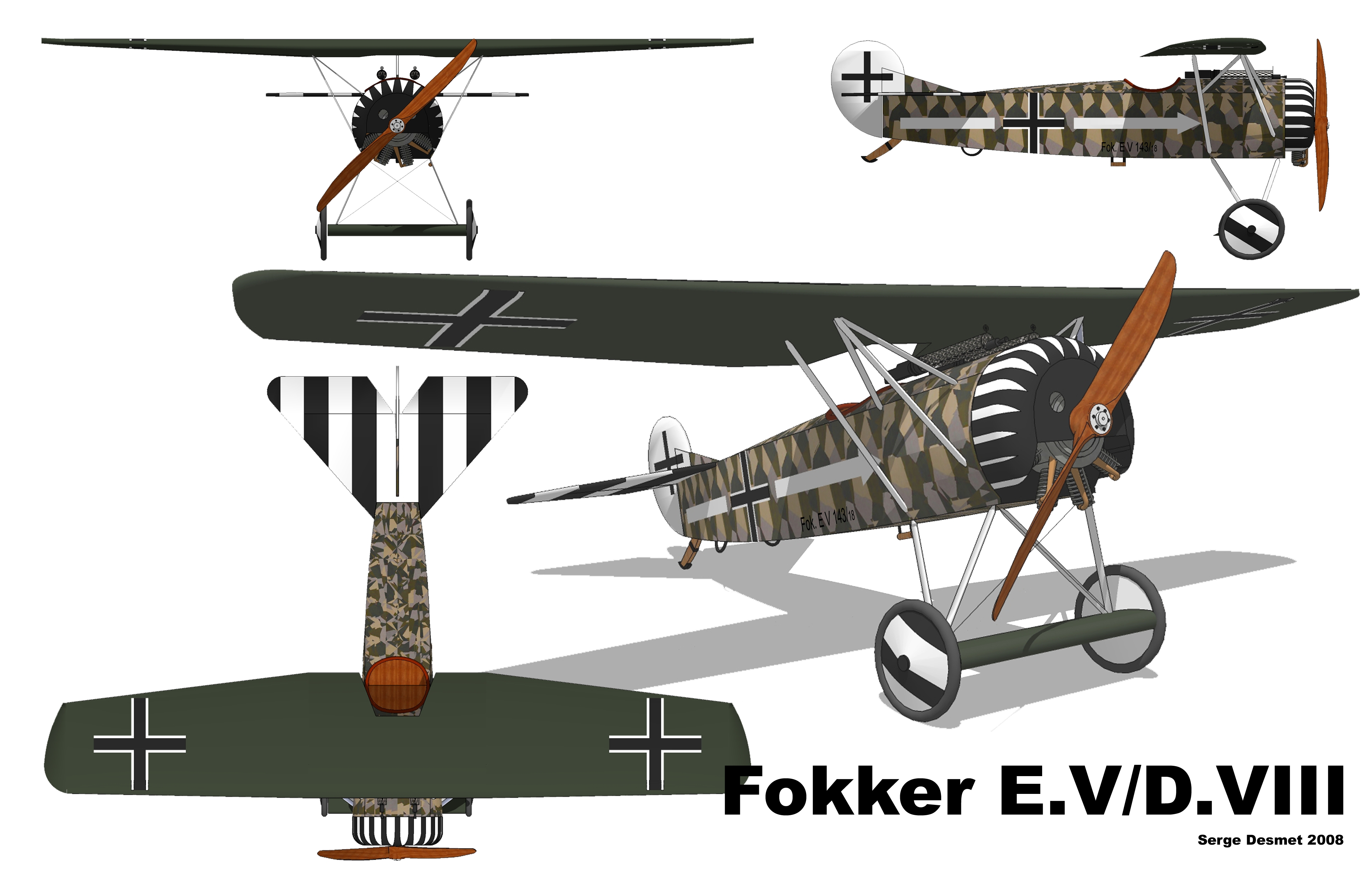 Plan 3 vues du Fokker D.VIII